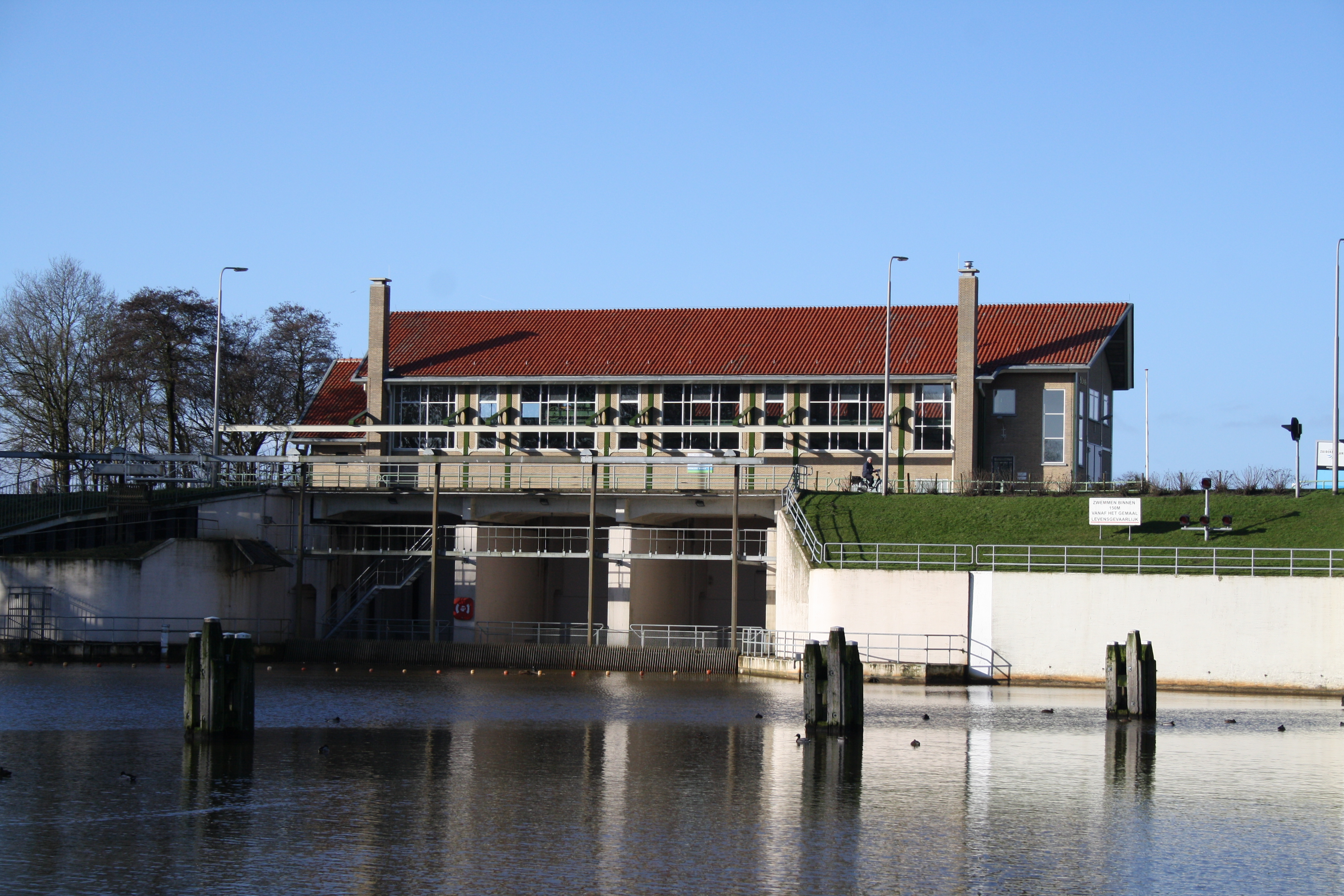 Gemaal Buma - Rutten - Noordoostpolder